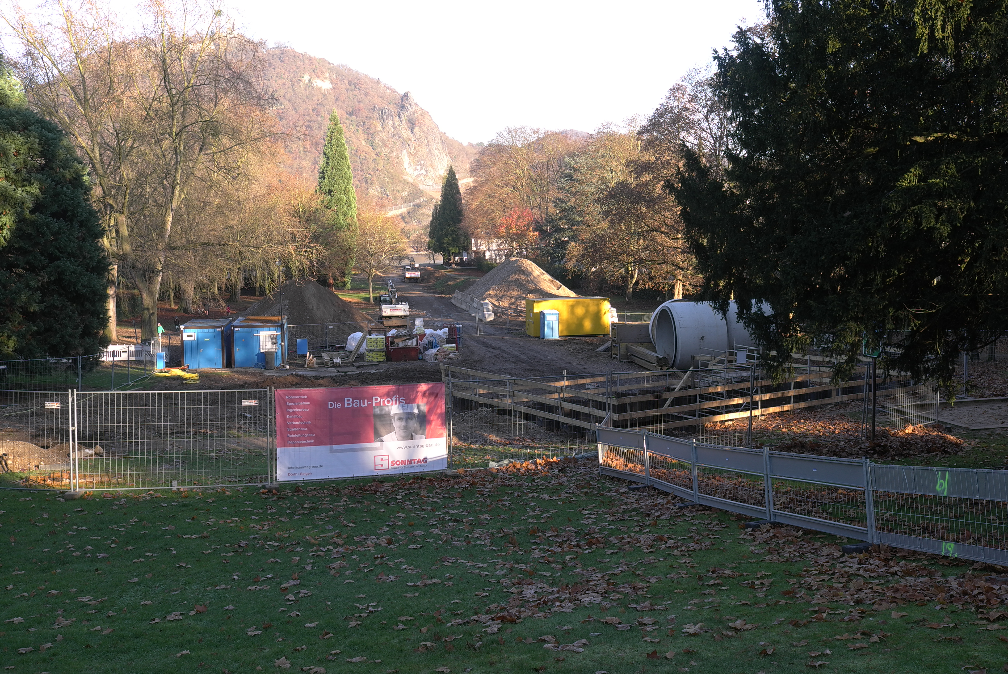 Baustelle des Entlastungskanals Mehlemer Bach im Drachensteinpark, Bonn-Mehlem